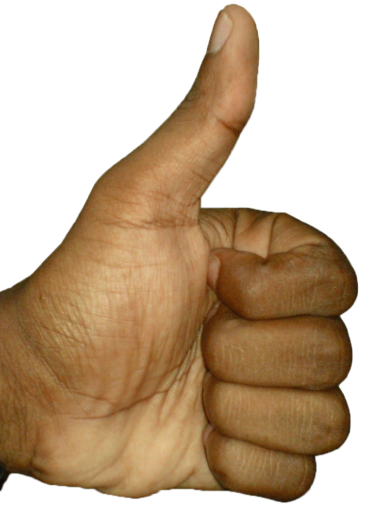 Pouce levé. Fond transparent.